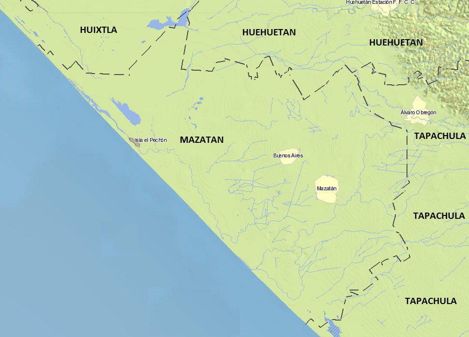 Mapa de relieve e hidrografía de Mazatán